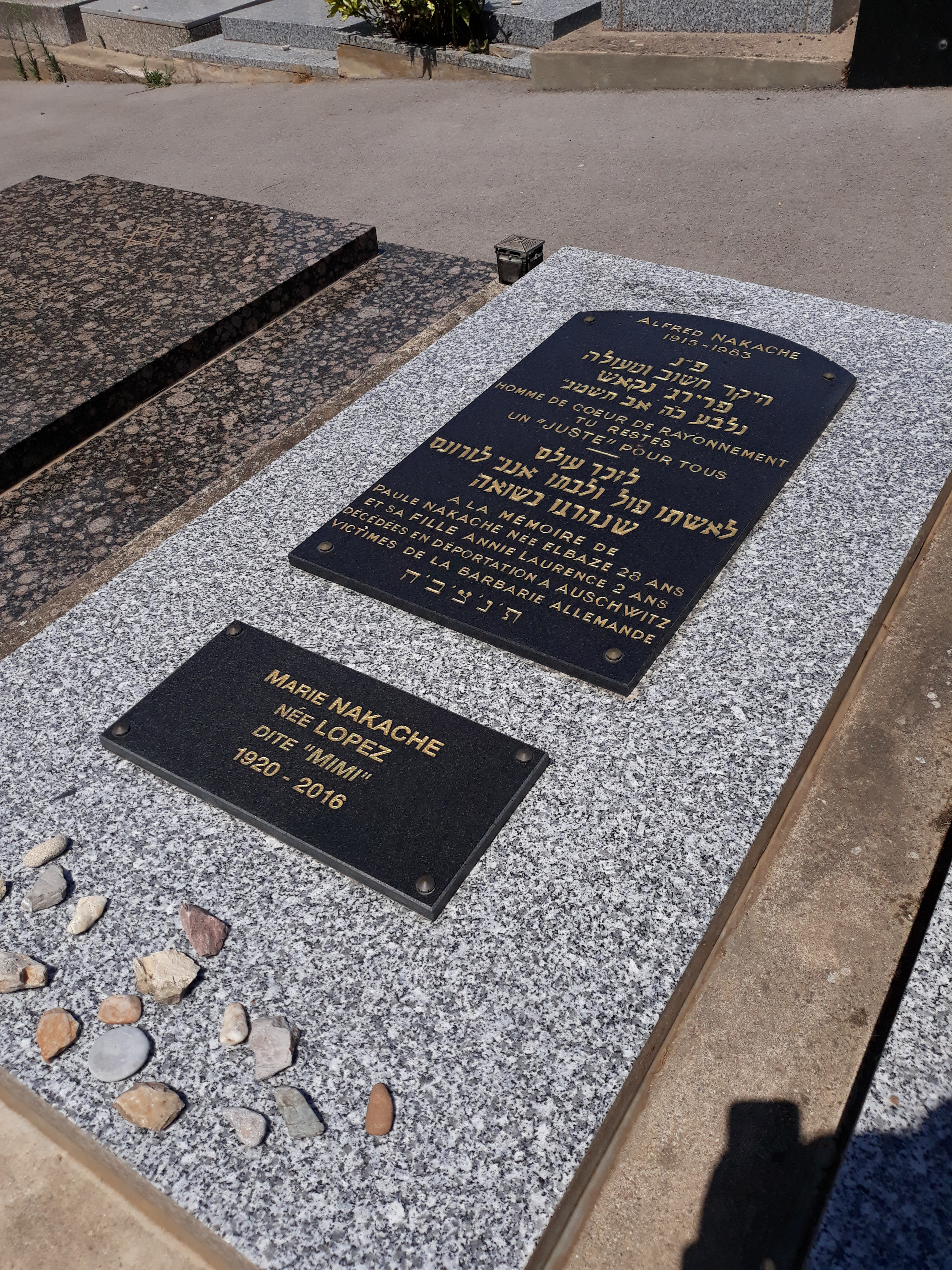 Das Grab des französischen Schwimmsportlers Alfred Nakache auf dem Cinetière de Py in Sète (Hérault).